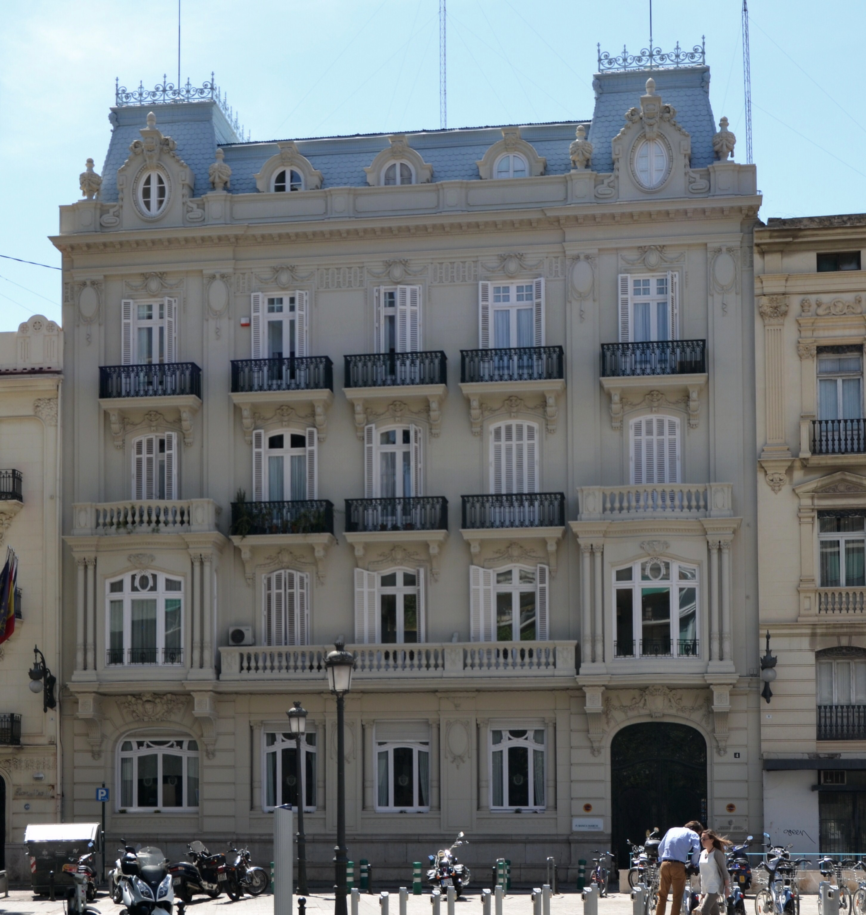 Casa Albacar, València.